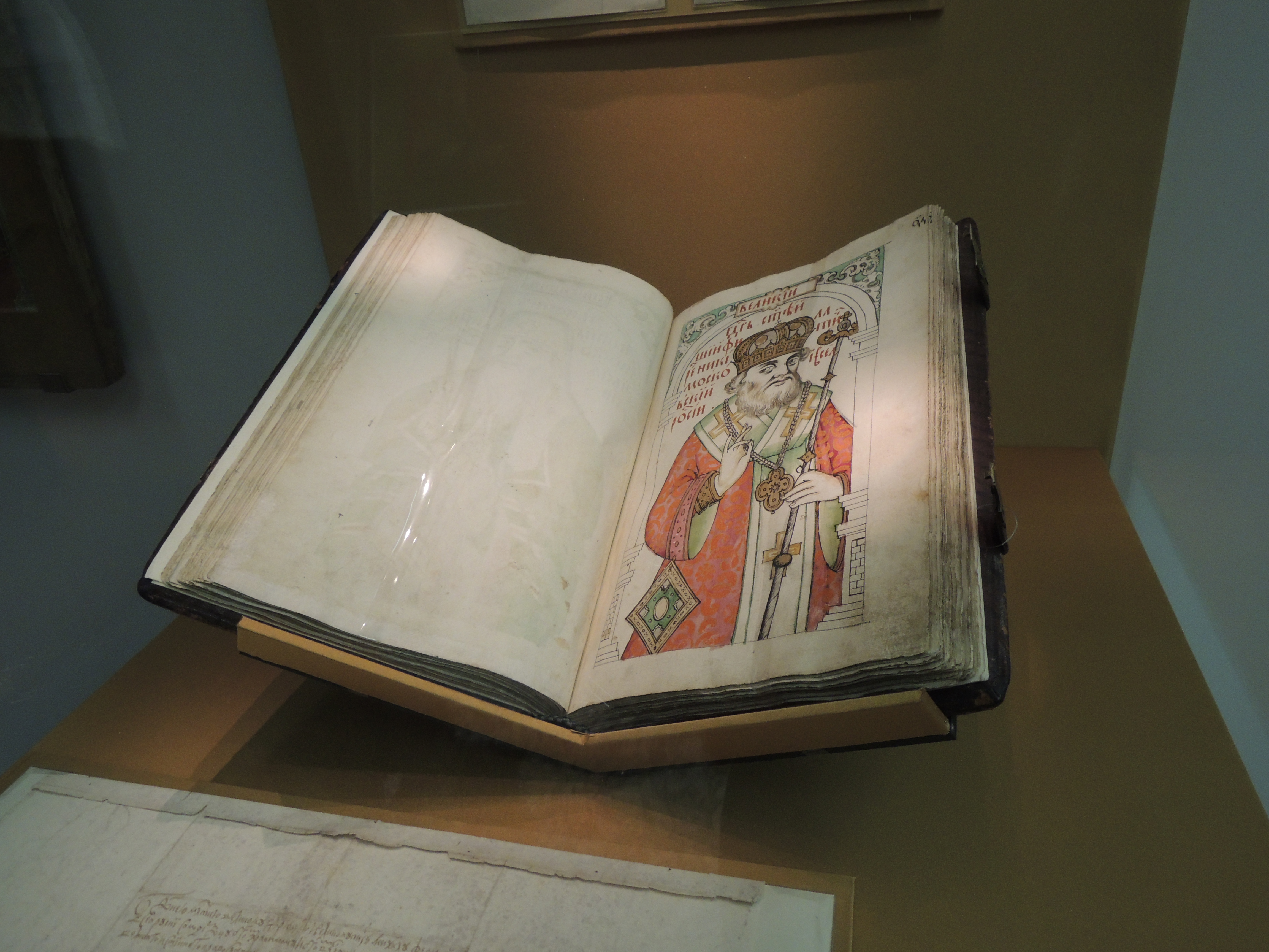 Титулярник (17 век, ГИМ) Выставка "Романовы. Начало династии", приуроченная к 400-летию избрания на царство Михаила Федоровича Государственный Исторический музей, весна 2013 года.